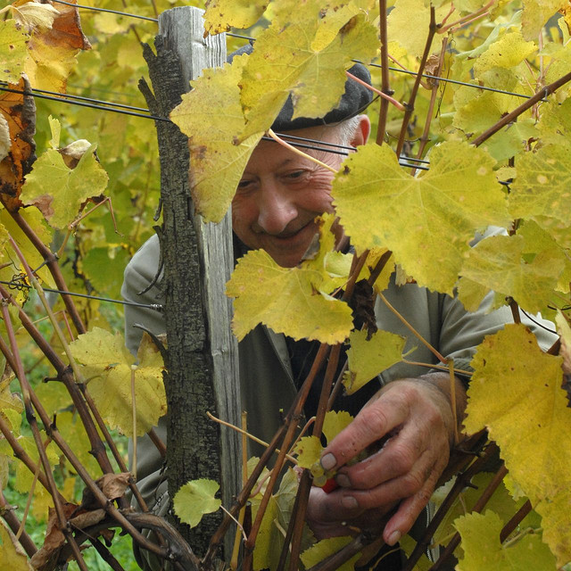 A picker picks. Vignoble du Jurançon. Vendangeur récoltant du petit manseng.